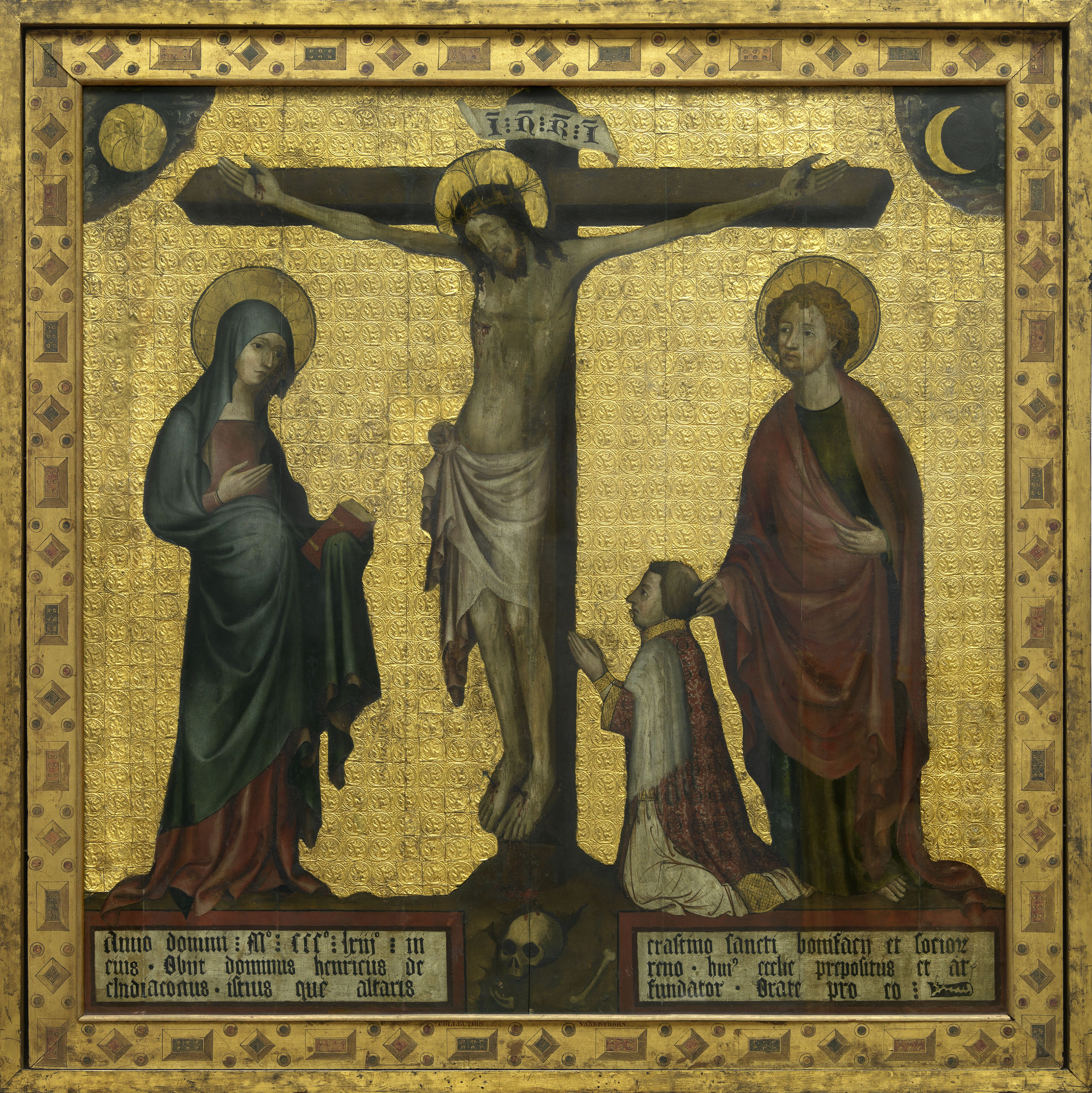 schilderij ( Anonieme Meester, 14de eeuw, koninklijk museum voor schone kunsten antwerpen